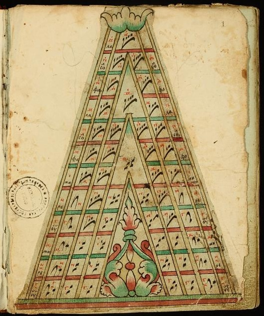 Фитник. 1-я четв. XIXв. и 2-я четв. XIXв. Полуустав. 52 л. Шифр 379-9. Рукопись составная (ч. 2 начинается с л. 42). Собрание рукописных книг протоиерея Д. В. Разумовского. на сайте Троице-Сергиевой лавры